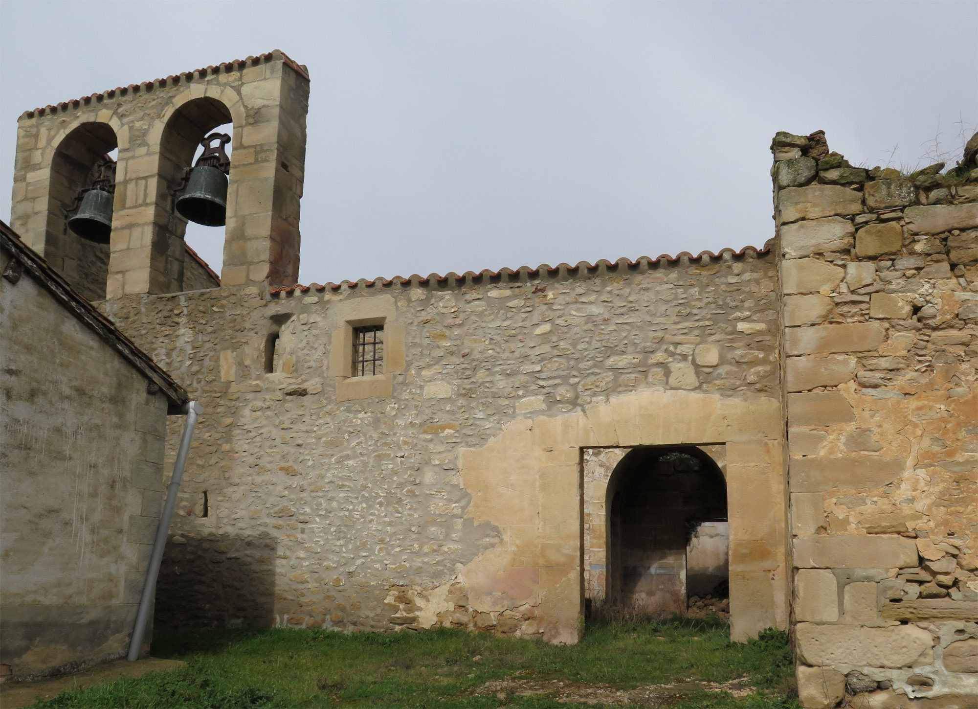 Fachada de la iglesia de Villabezana (Álava, España), en ruinas